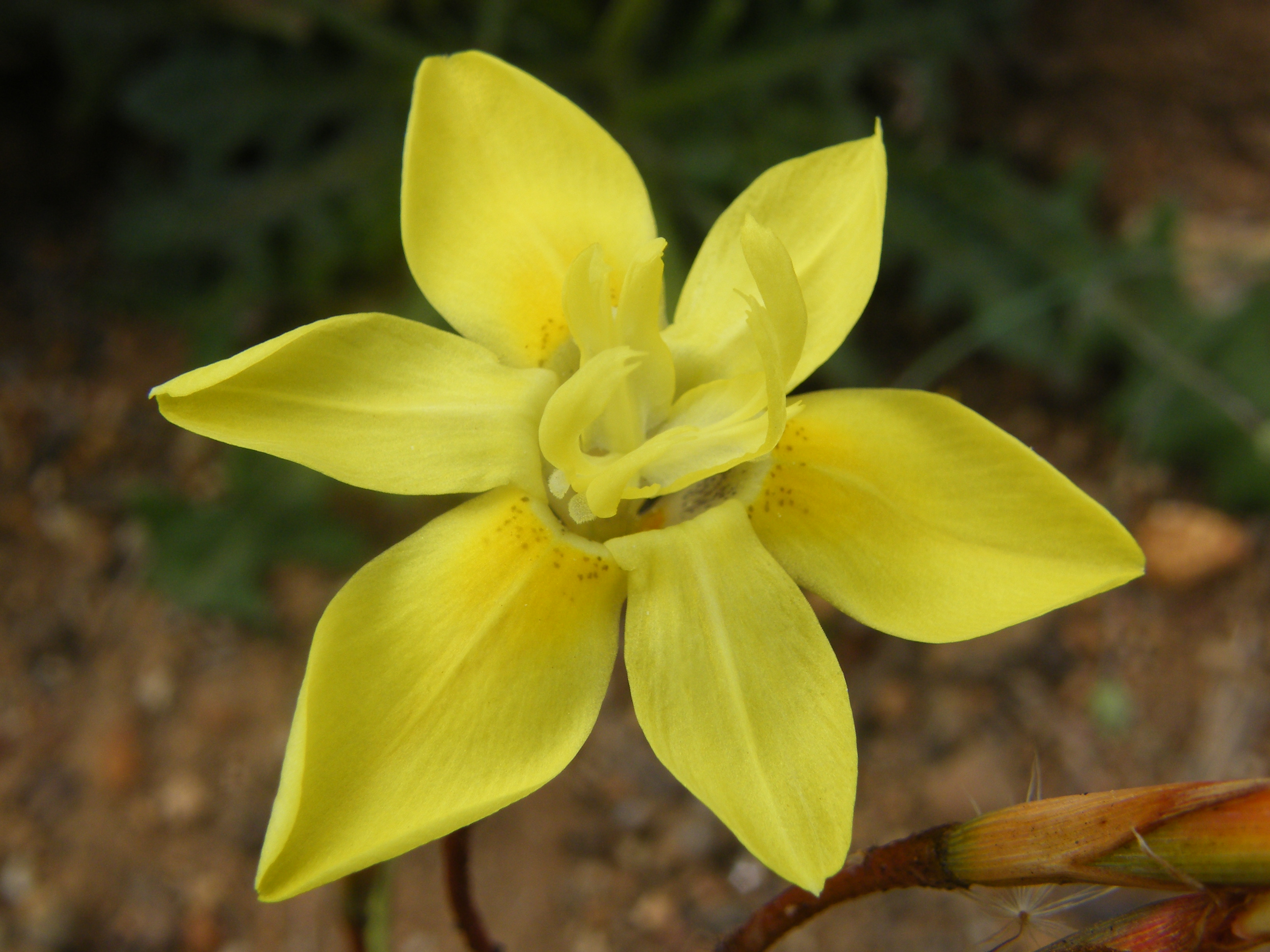 Teeruintjie